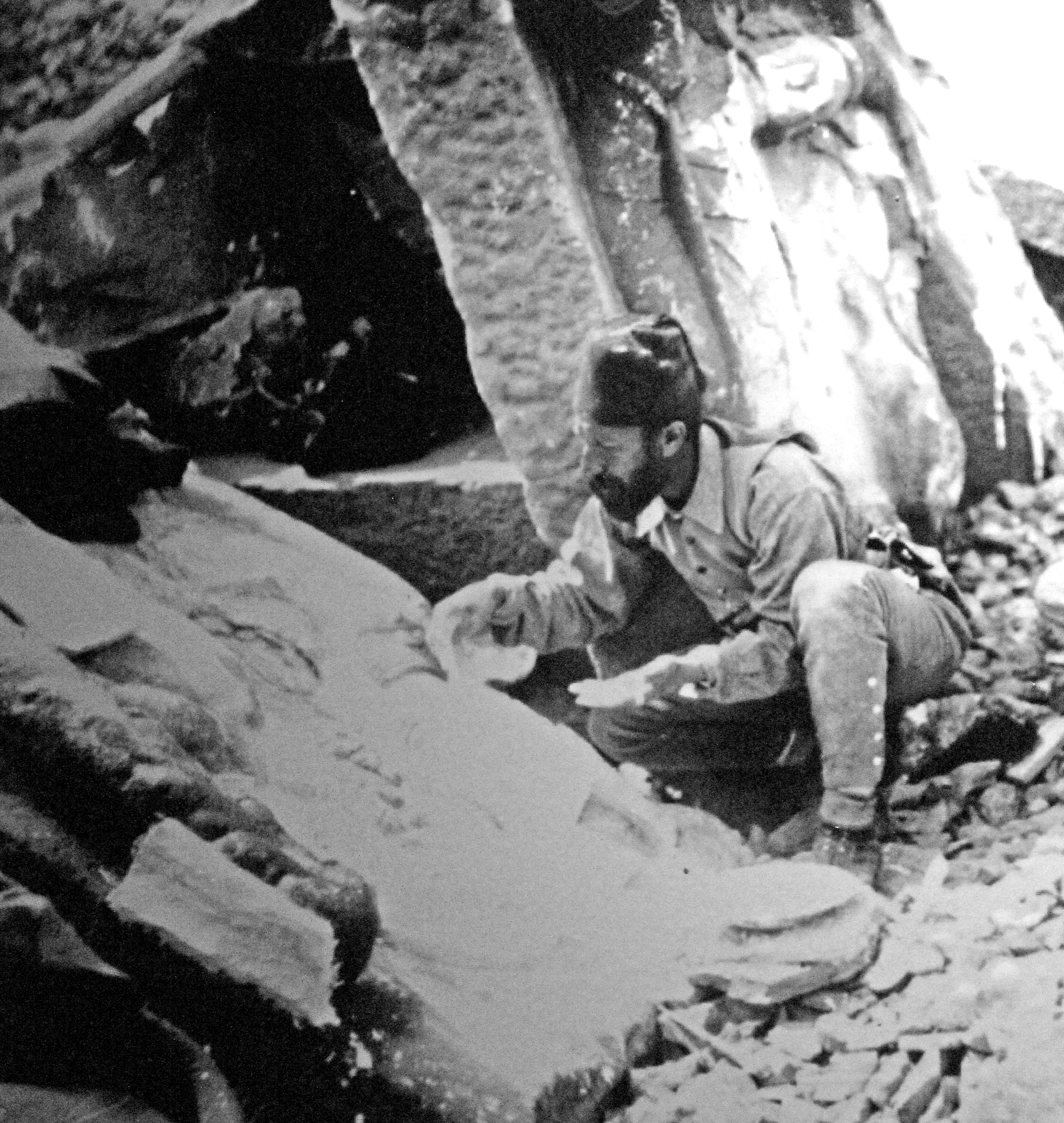 Der türkische Archäologe Osman Hamdi Bey bei Ausgrabungen auf dem Nemrut Dağı